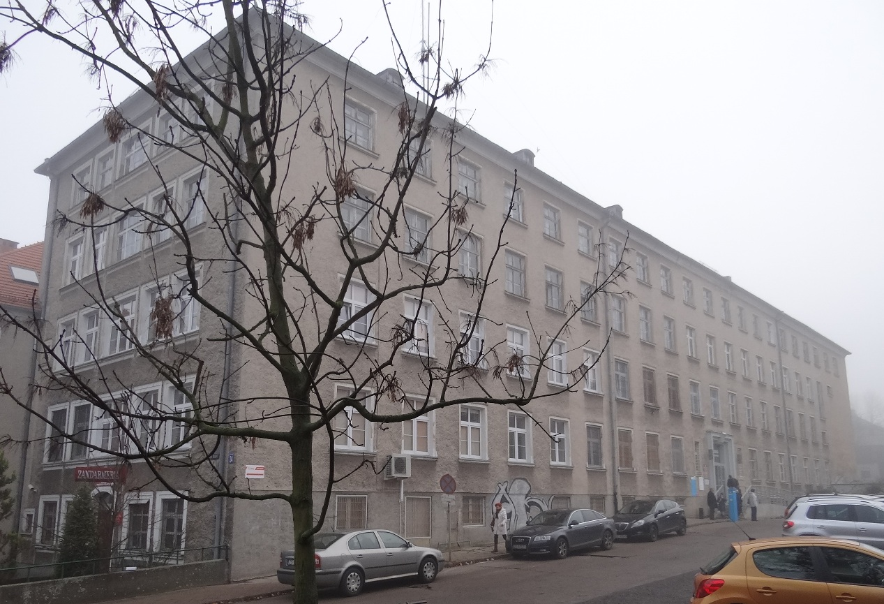 Szczecin - Przychodnia 109 Szpitala Wojskowego